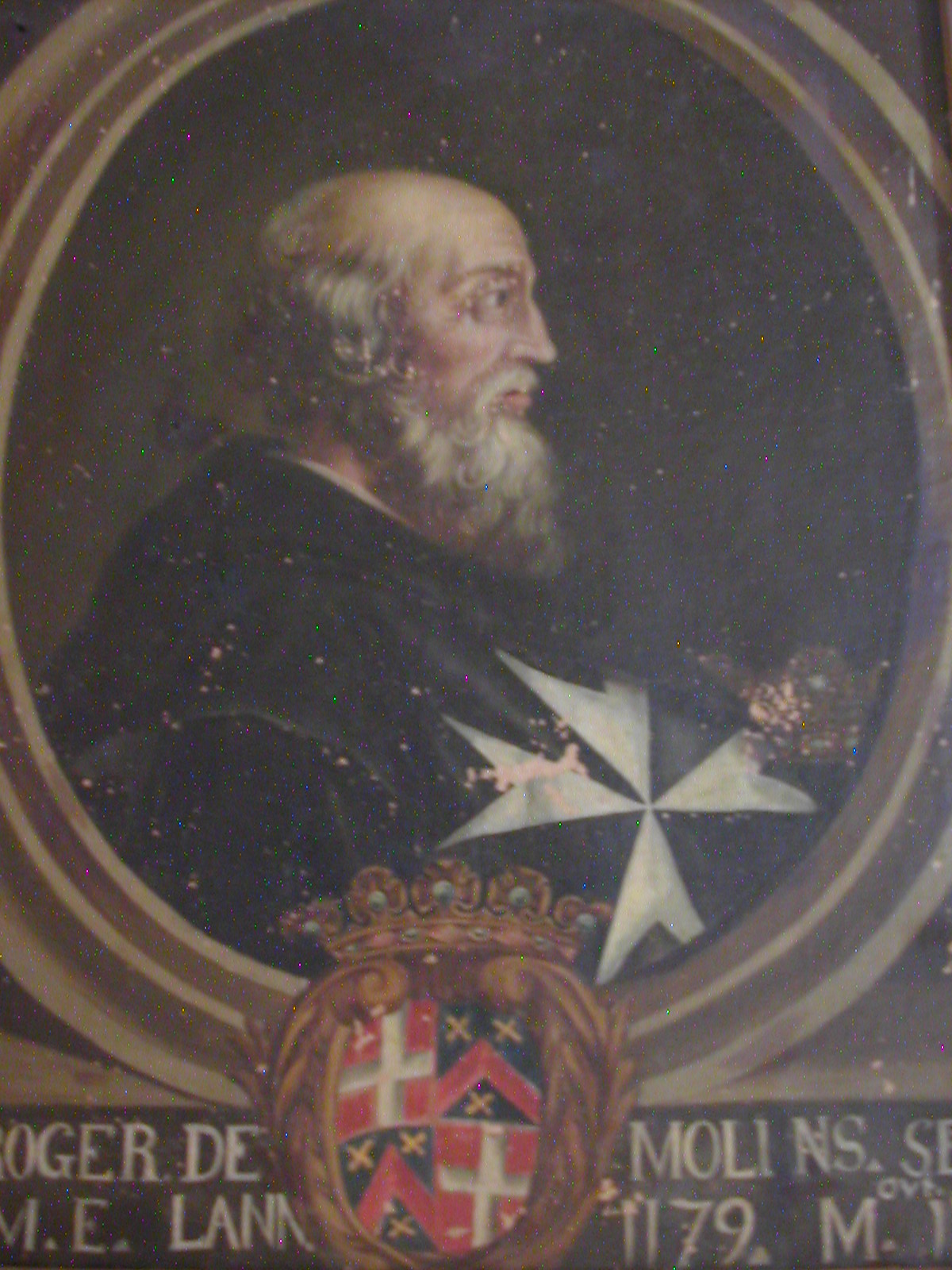 Portrait de Roger de MOULINS (collection de Thoury)